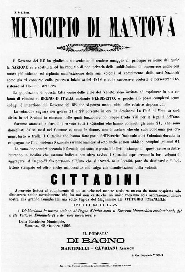 annuncio del Plebiscito di Mantova per far parte del Regno d' Italia